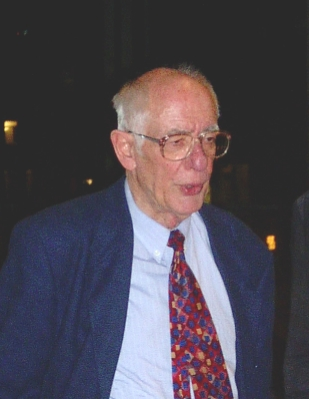 Der Kunsthistoriker Peter H. Feist während einer Ausstellungseröffnung im Oktober 2009.